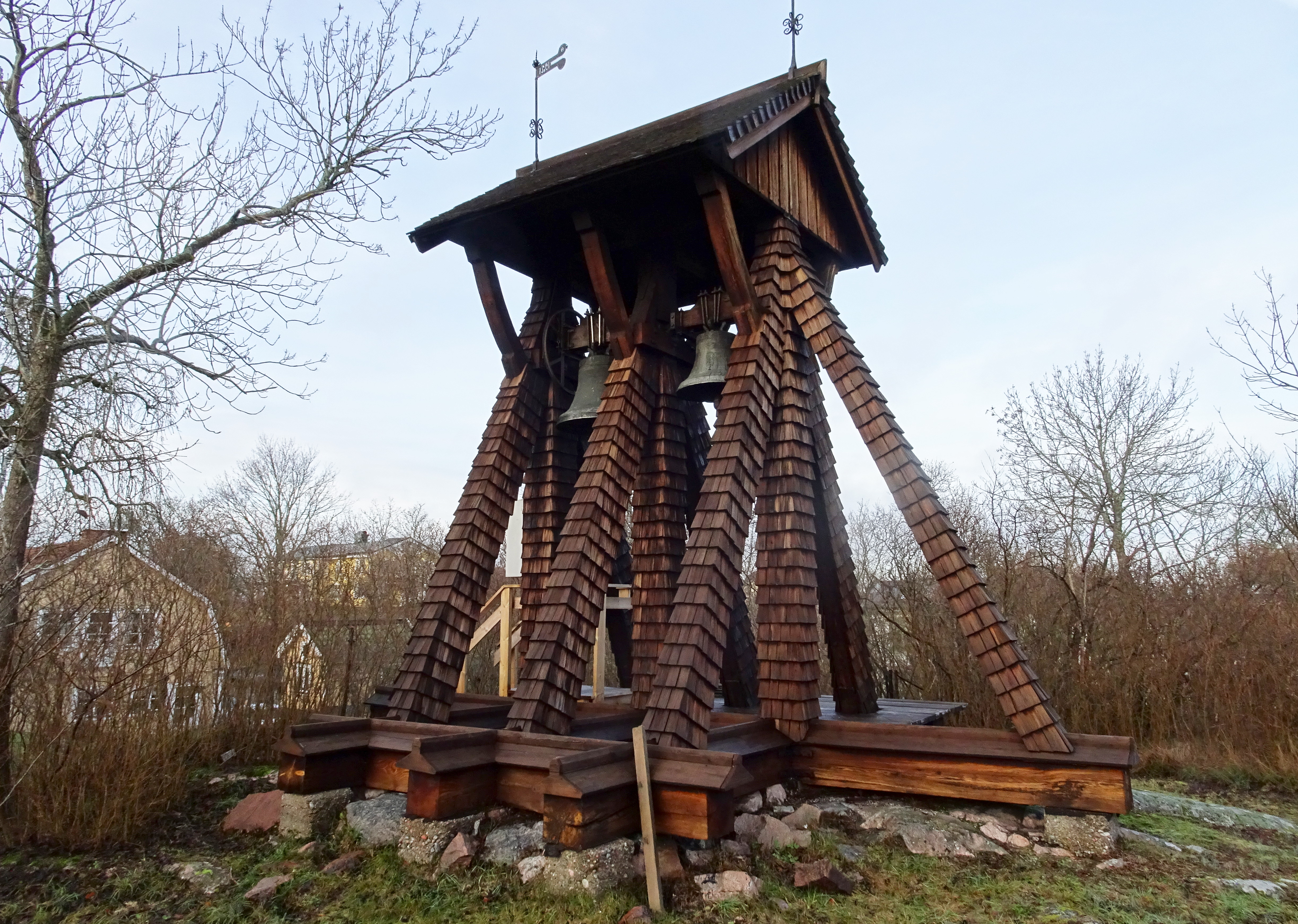 Klockstapeln på Flaggberget, Drottningholm